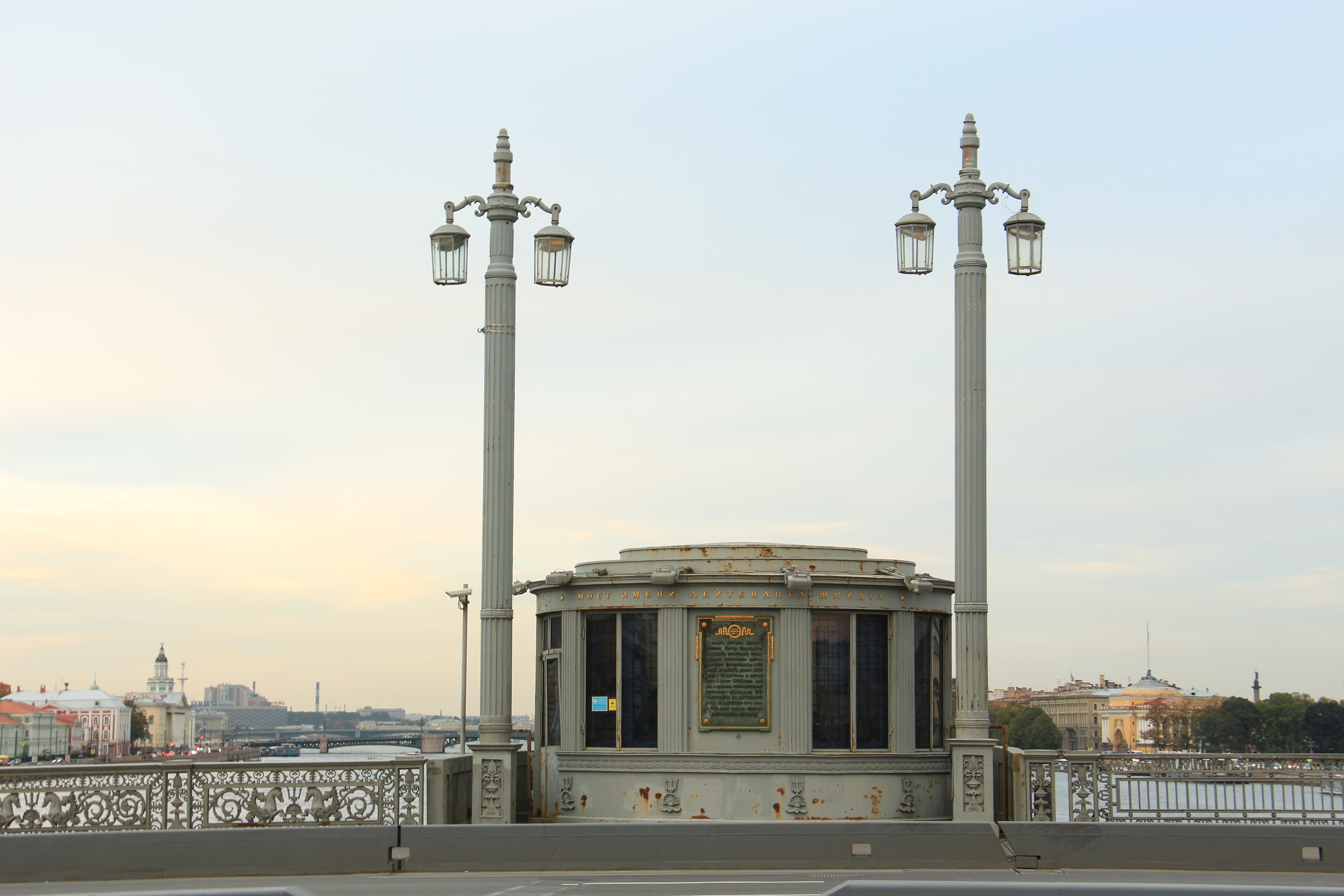 Ограждение, фонари и павильоны Благовещенского моста: через р. Неву, соединяет площадь Труда и Васильевский остров, Адмиралтейский район, Санкт-Петербург